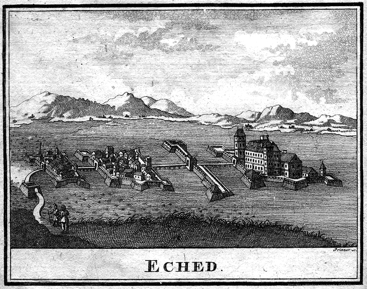 A Prixner-féle dupla várrajz, ez a legismertebb ábrázolás az egykori Ecsedi várról